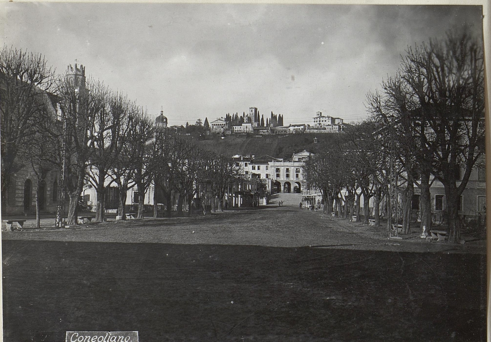 Cornegliano.